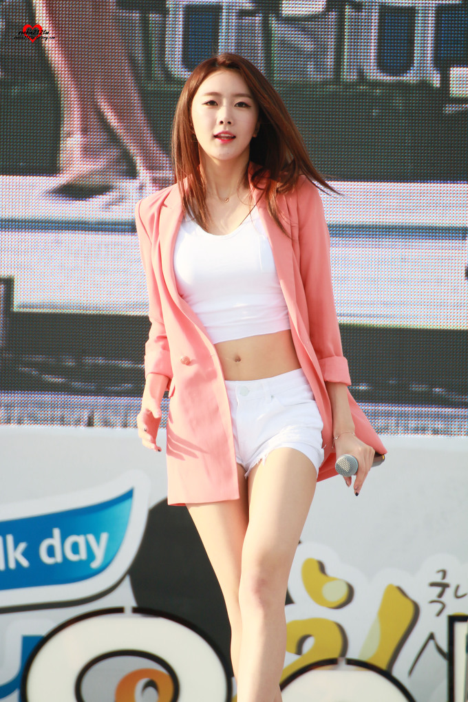 160528 달샤벳-수빈 경기 공개방송 직찍